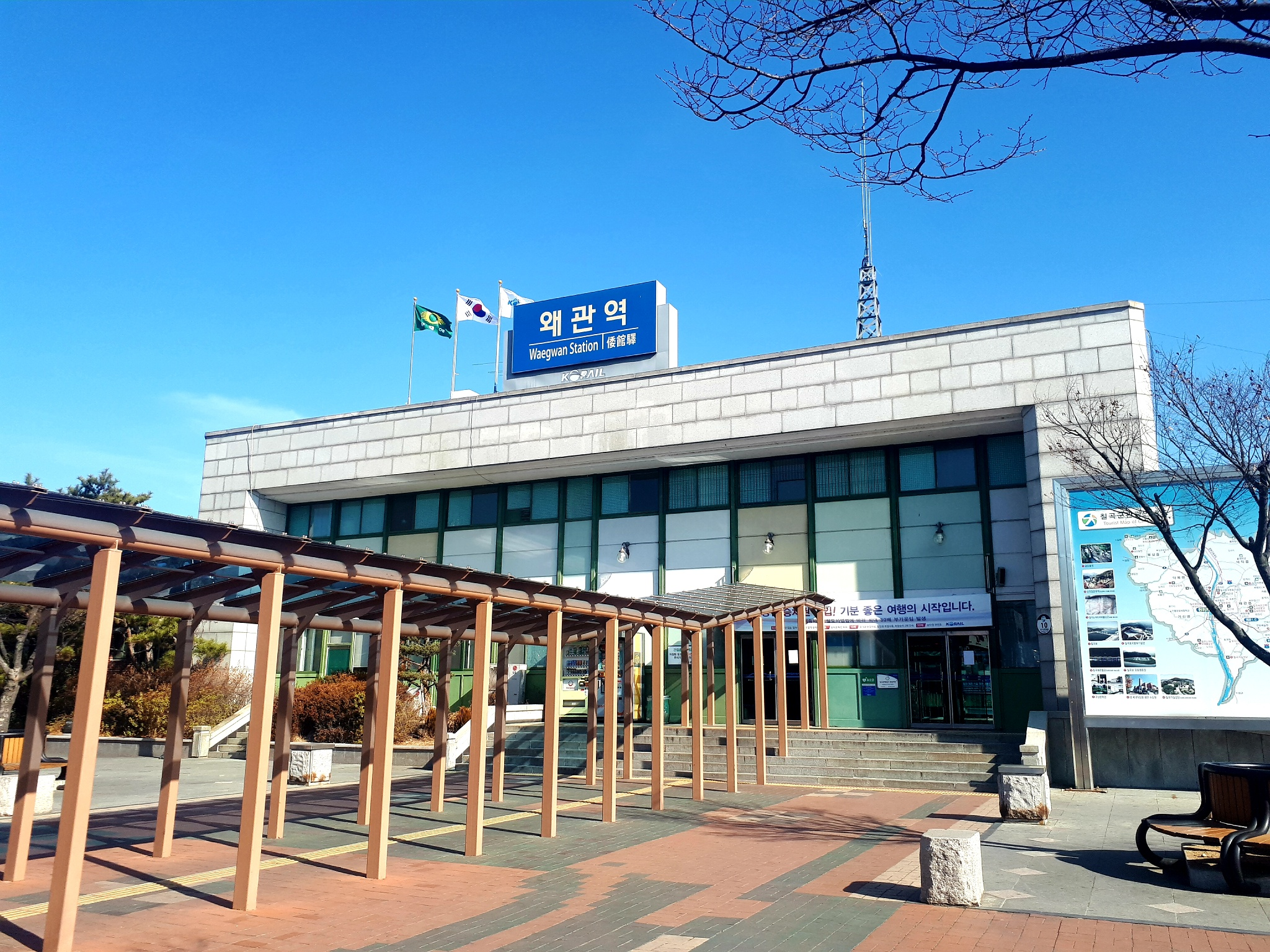 2019년 1월에 촬영한 왜관역 전면부 사진입니다. 대한민국 경상북도 칠곡군 왜관읍의 중심 철도역으로서, 경부선의 주요 역입니다.